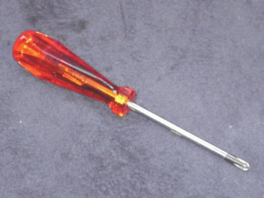 Ein Schraubenzieher